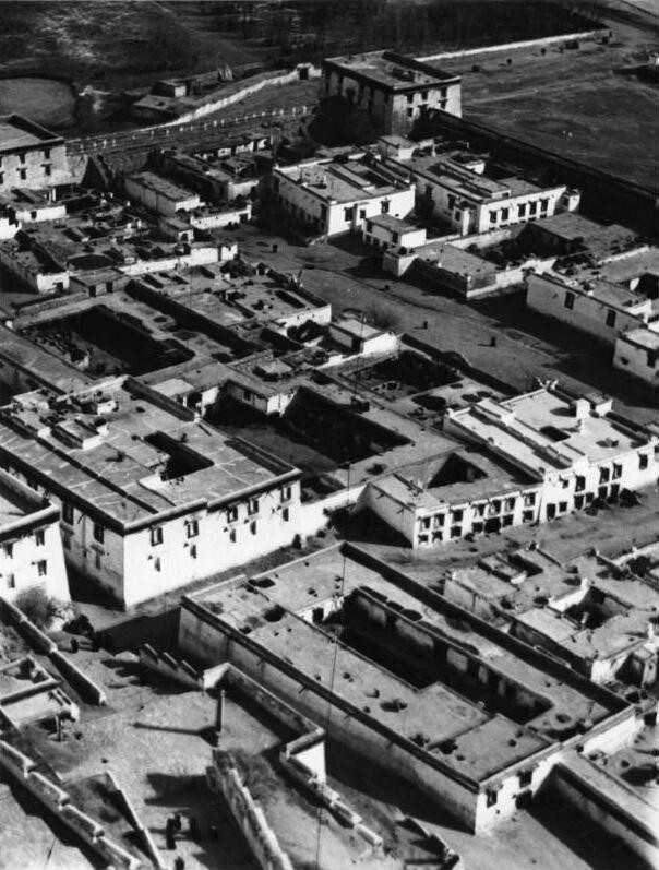 Lhasa, Blick vom Potala auf die Potalastadt